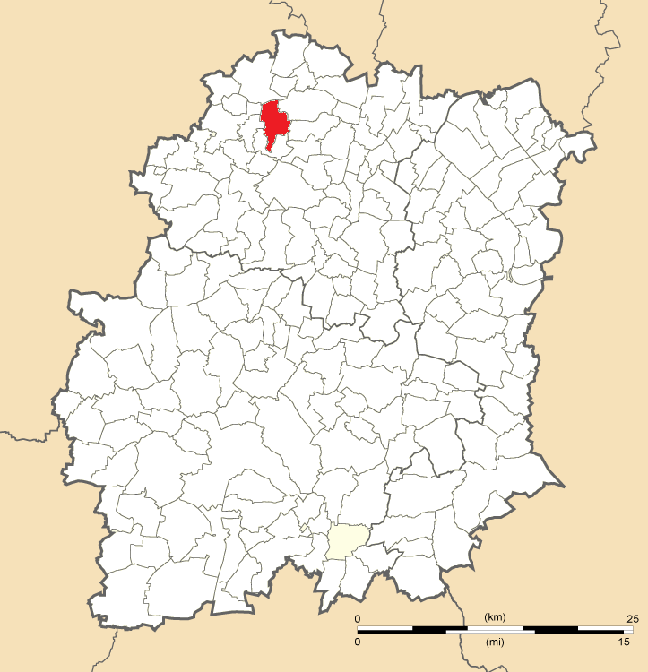 Carte de position d'Orsay dans l'Essonne.